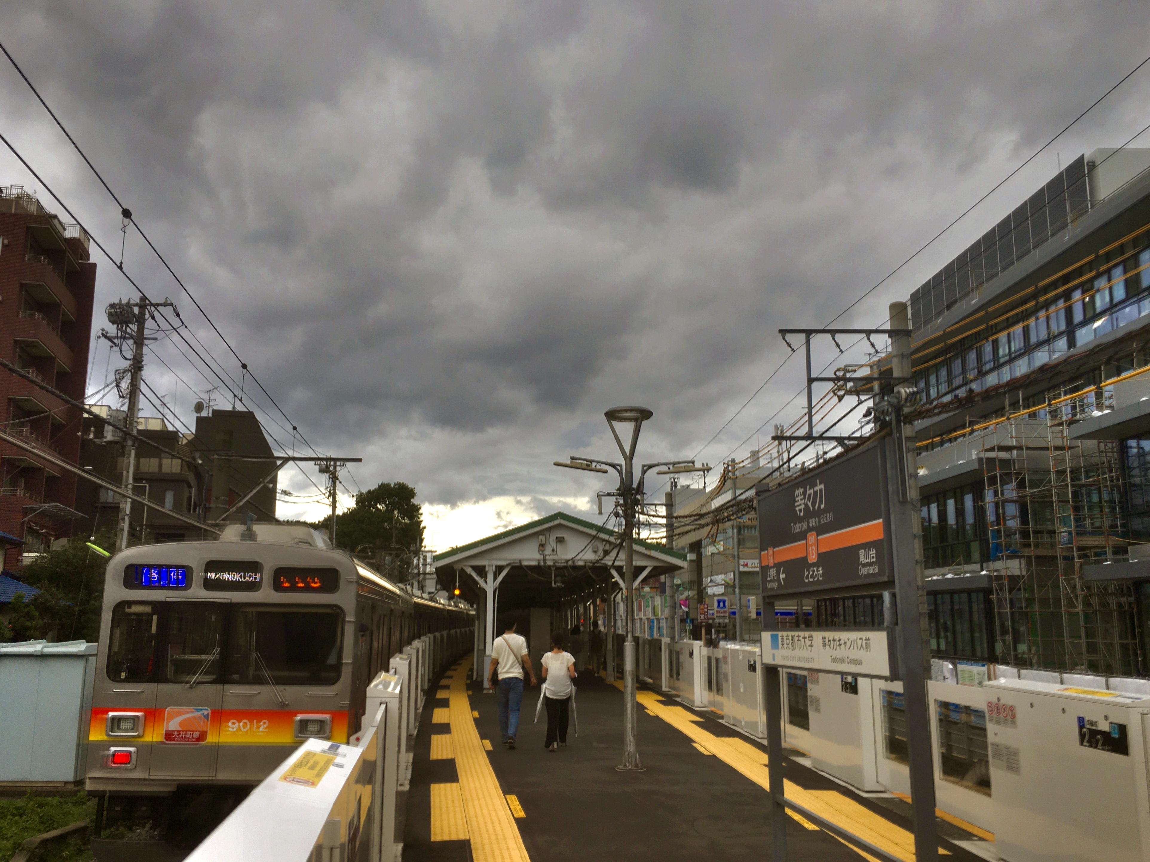 Todoroki Station (等々力駅)